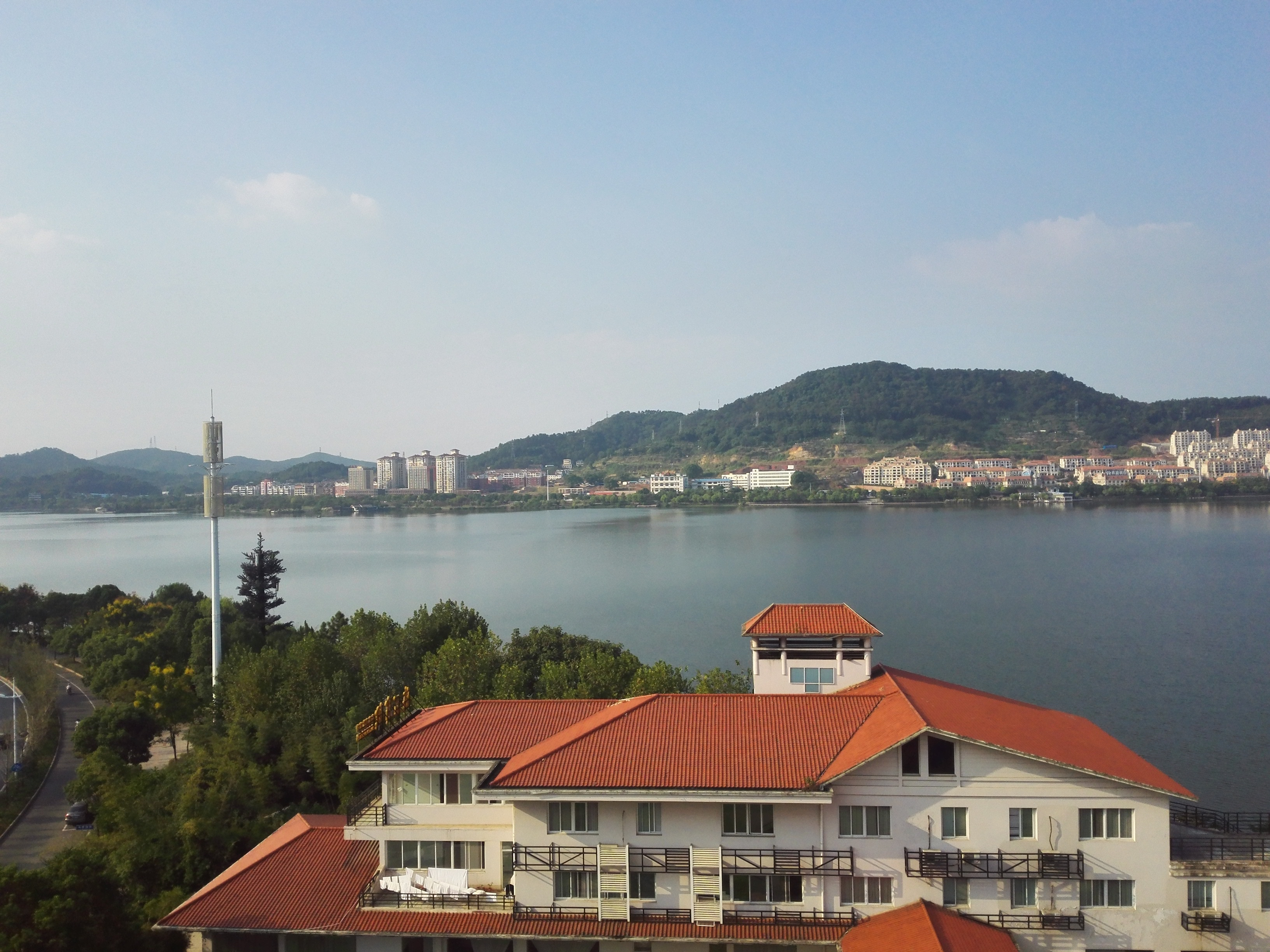 中文（中国大陆）: 黄石磁湖风景